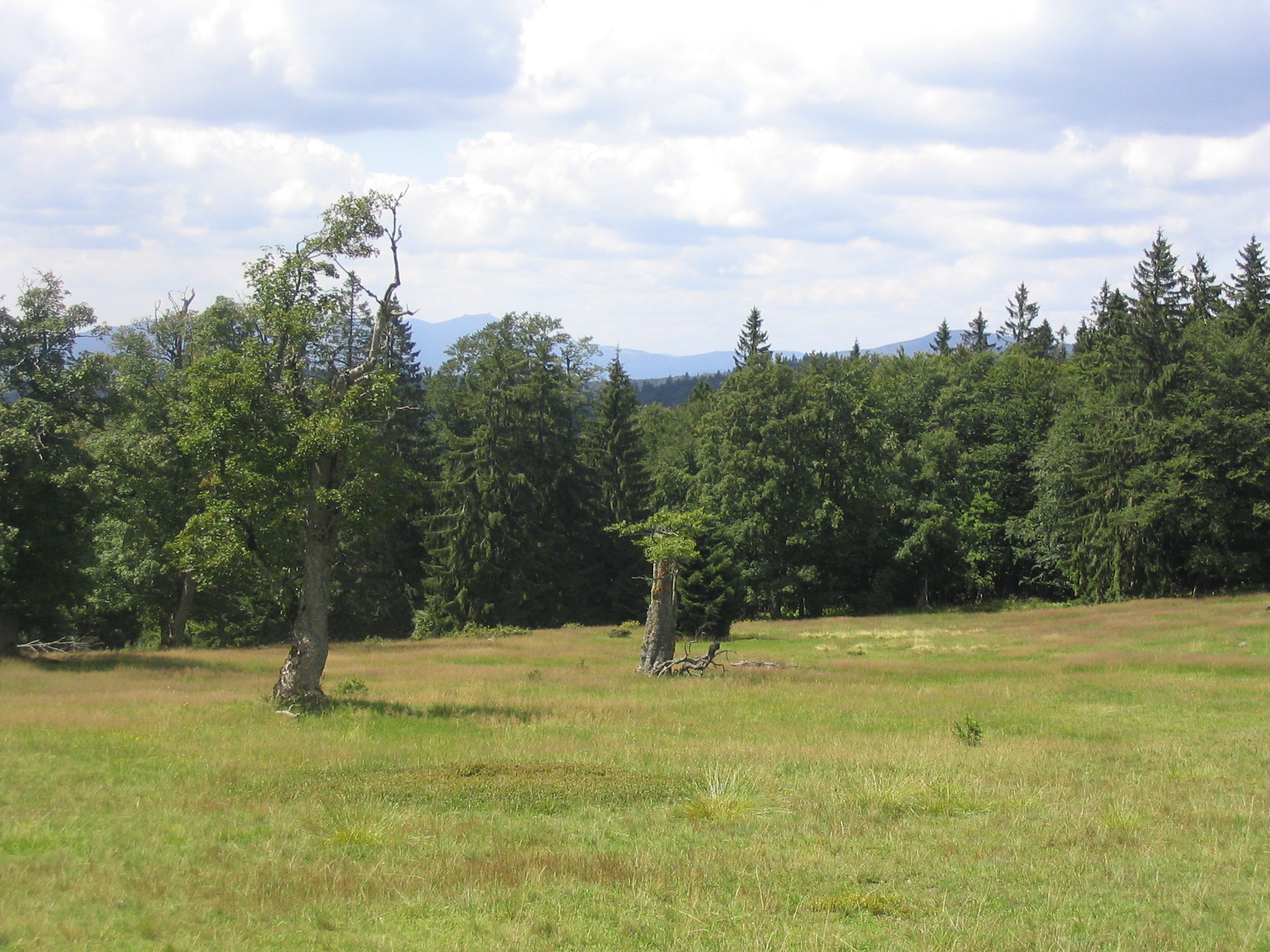 Schachten im Bayerischen Wald Aufgenommen am 31.07.2007 von Dr. Hagen Graebner